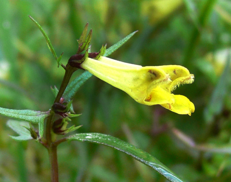 Mélampyre des prés (Melampyrum pratense, Scrophulariaceae ), hôte du papillon de jour Mélitée du mélampyre, ici en zone claire de la «Forêt domaniale de Fossard», Vosges (milieu acide), France